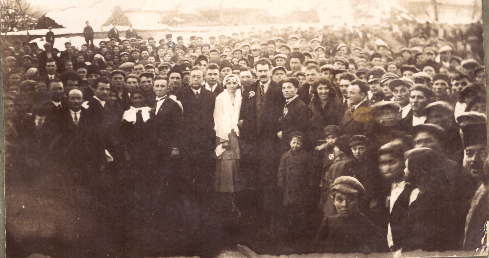 27.12.1931 г., Сватбата на Мара и Йордан Влахови, с. Малорад, Ореховска околия, на която присъства елитът на БЗНС "Врабча 1"